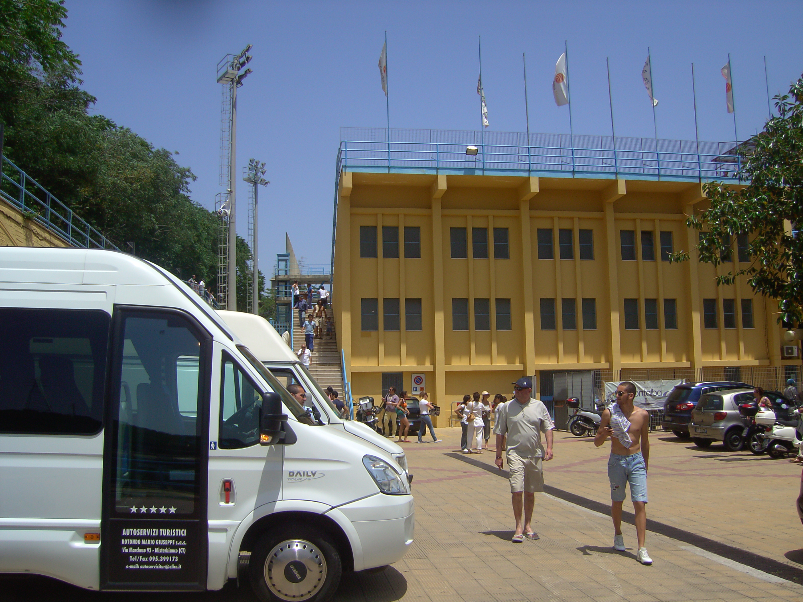 Ingresso per accedere alla piscina scoperta dell'impianto Cappuccini